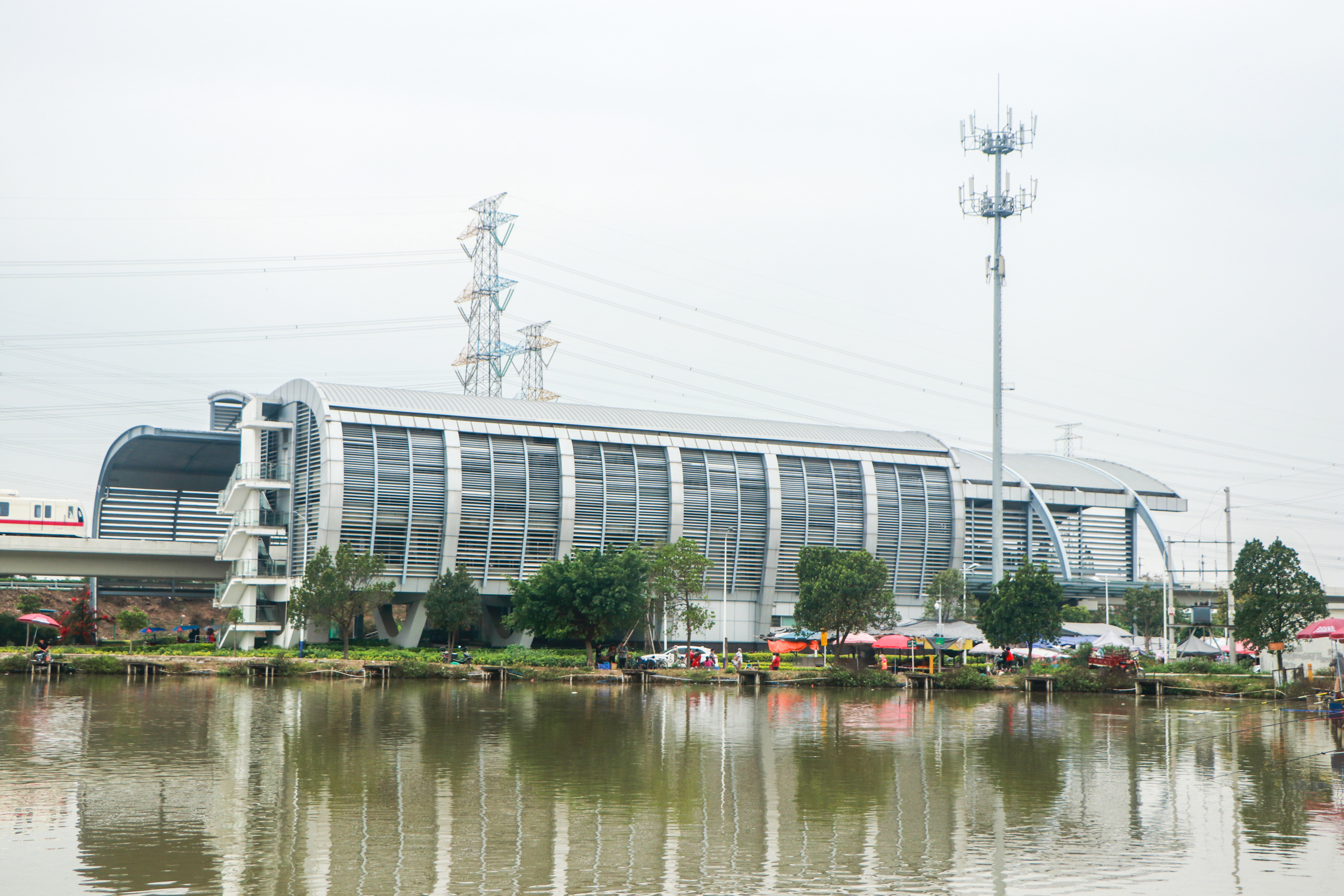 广州地铁低涌站